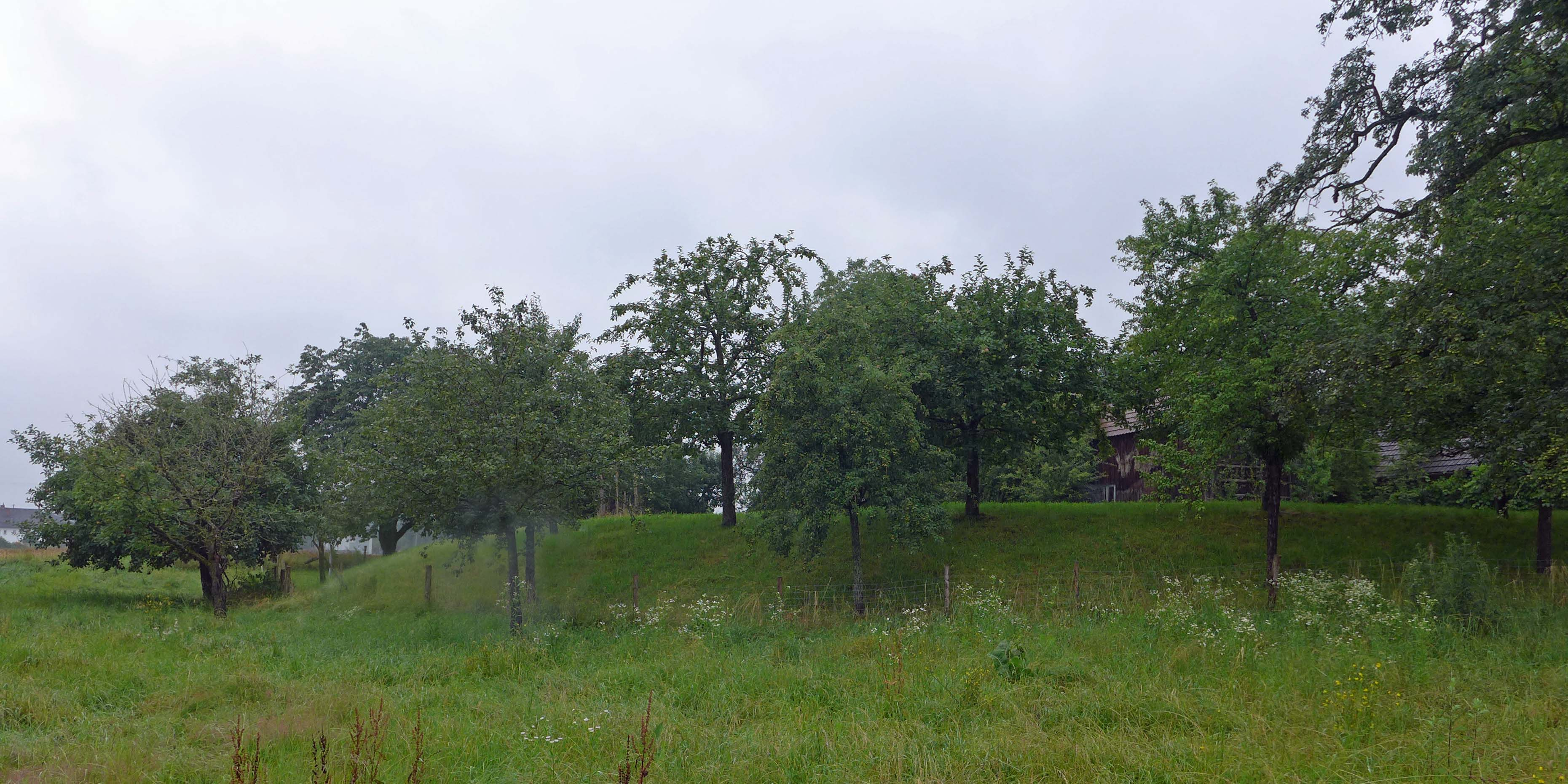 Naarn im Machland. Oberösterreich. Hausbergplateau bzw. Substruktion des Harter Schlössls. Ansicht von Süden. Kreisförmiges Plateau mit ~ 54 m Durchmesser. Adresse Schlösslweg Nr. 18 (das Gebäude ist nicht ein Schlösslgebäude, sondern ein Nachfolgebau).